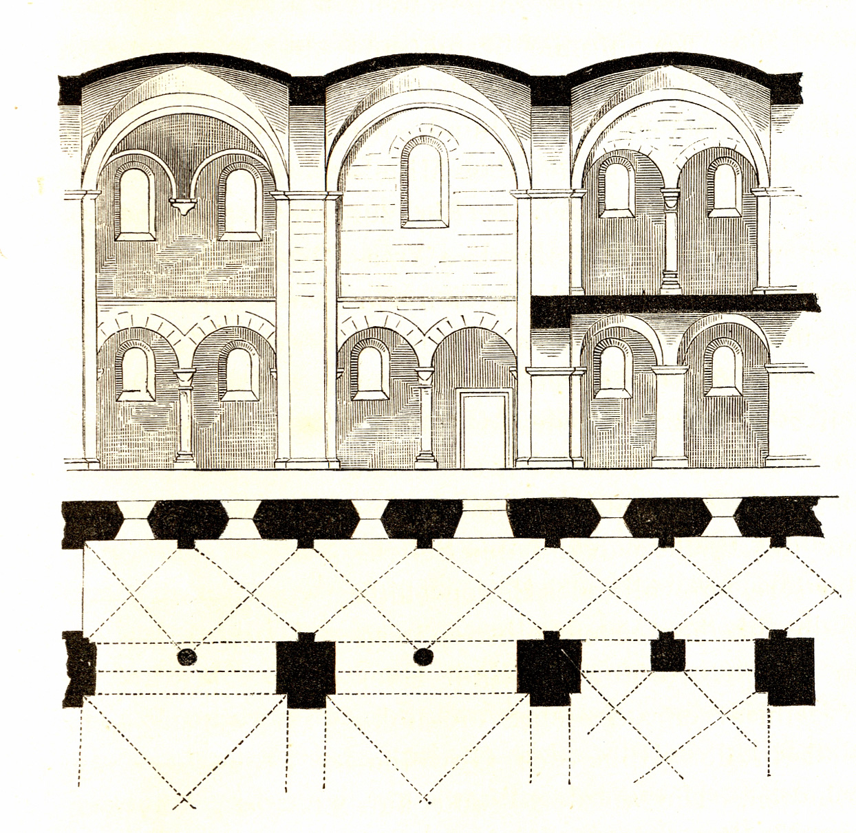 Zeichnung aus dem Jahrbuch der kaiserl. königl. Central-Commission zur Erforschung und Erhaltung der Baudenkmale III. 1859. 1-104. Zuordnung entsprechend Dateinamen August Ottmar Essenwein (1831–1892) Description German architect and writer Date of birth/death2 November 183113 October 1892Location of birth/deathKarlsruheNurembergAuthority control VIAF: 51804595 LCCN: n86016586 GND: 119022192 BnF: cb12551826g ULAN: 500014044 ISNI: 0000 0001 1062 3760 WorldCat WP-Person